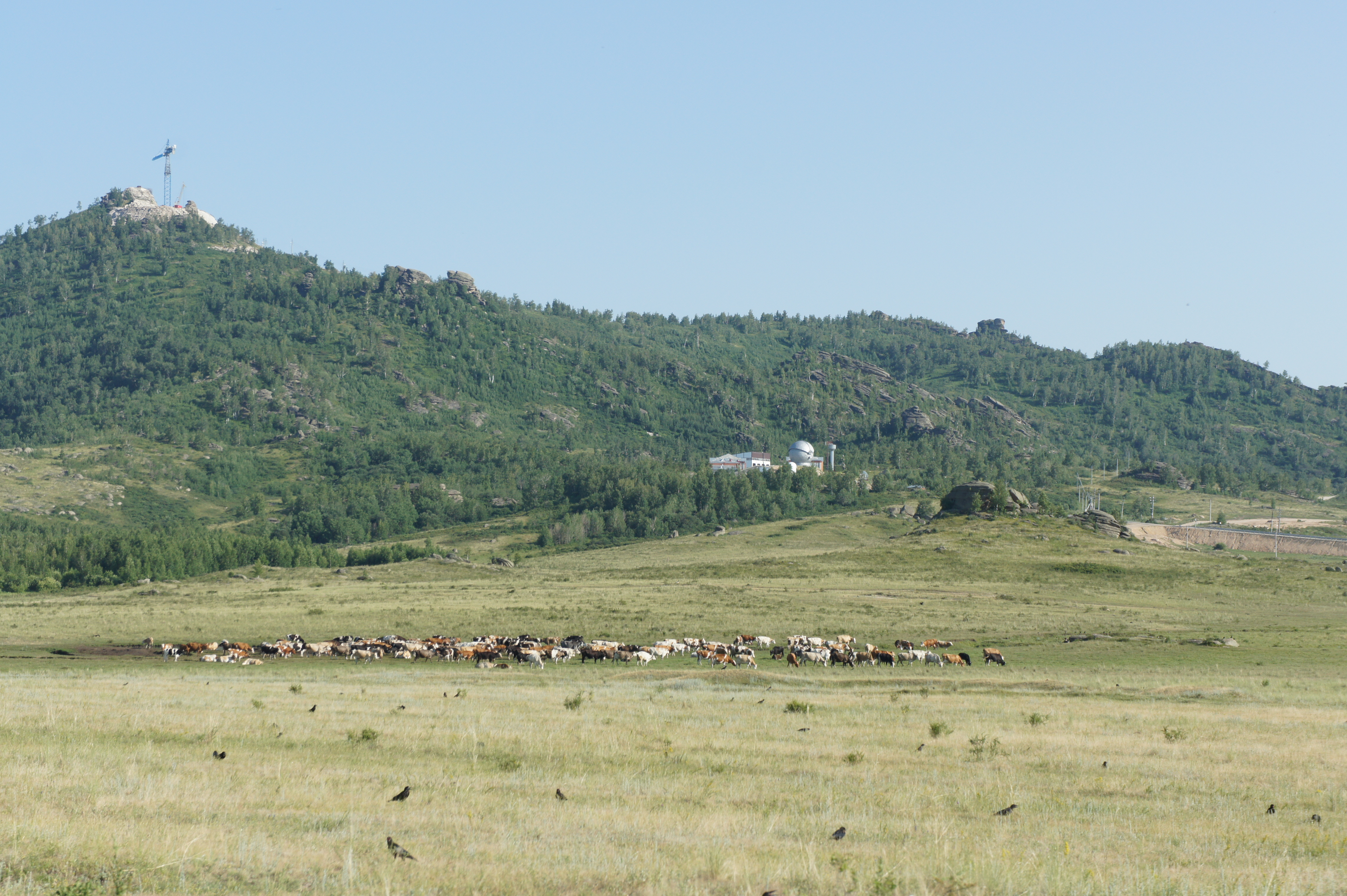 Колыванский хребет: гора Большая в окрестностях села Саввушка. Строительство Алтайского Оптико-Лазерного центра им. Г.С. Титова